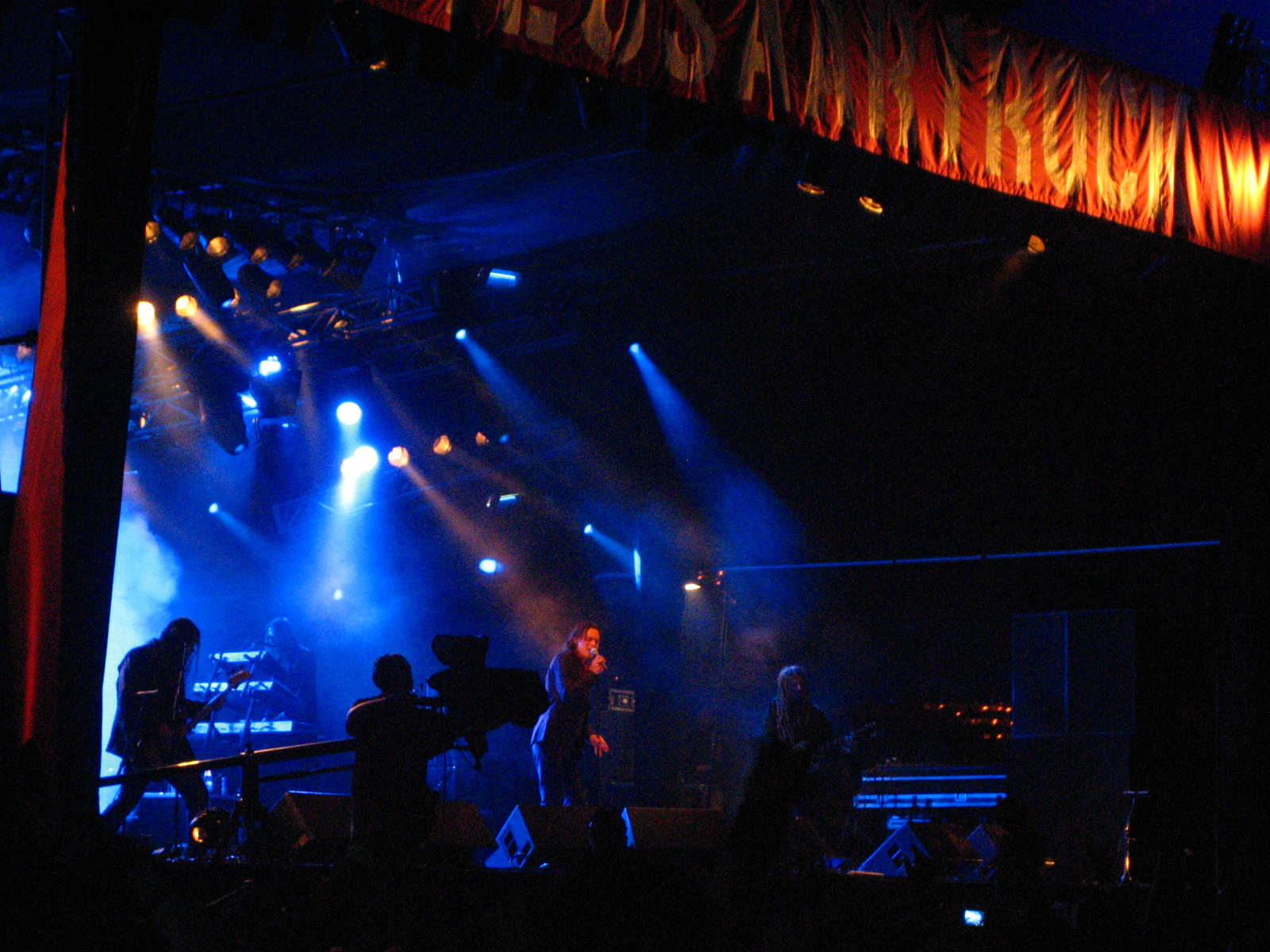 HIM Ilosaari 2007